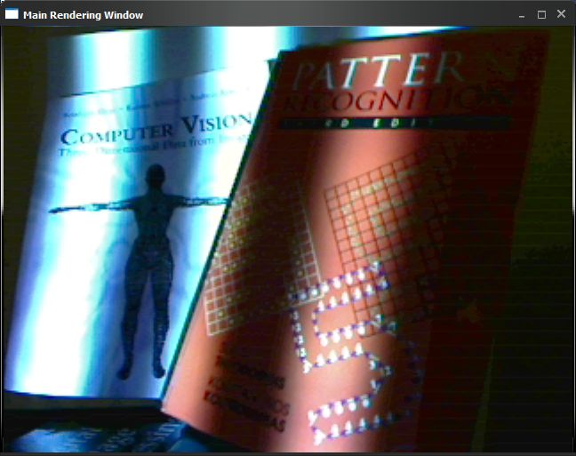 正弦波調變光投射至書本上。